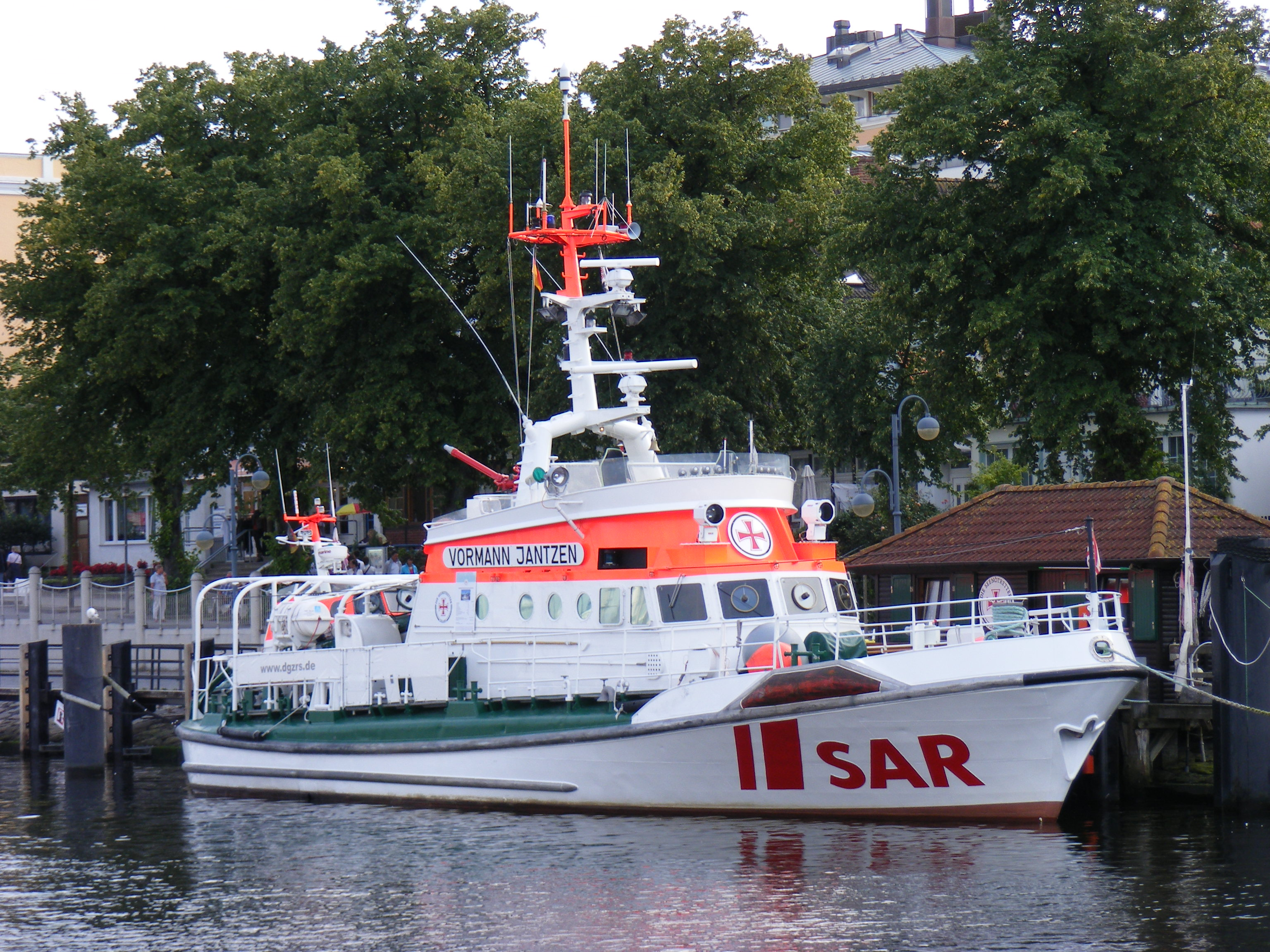 Seenotkreuzer "Vormann Jantzen" in Warnemünde, 16. August 2011